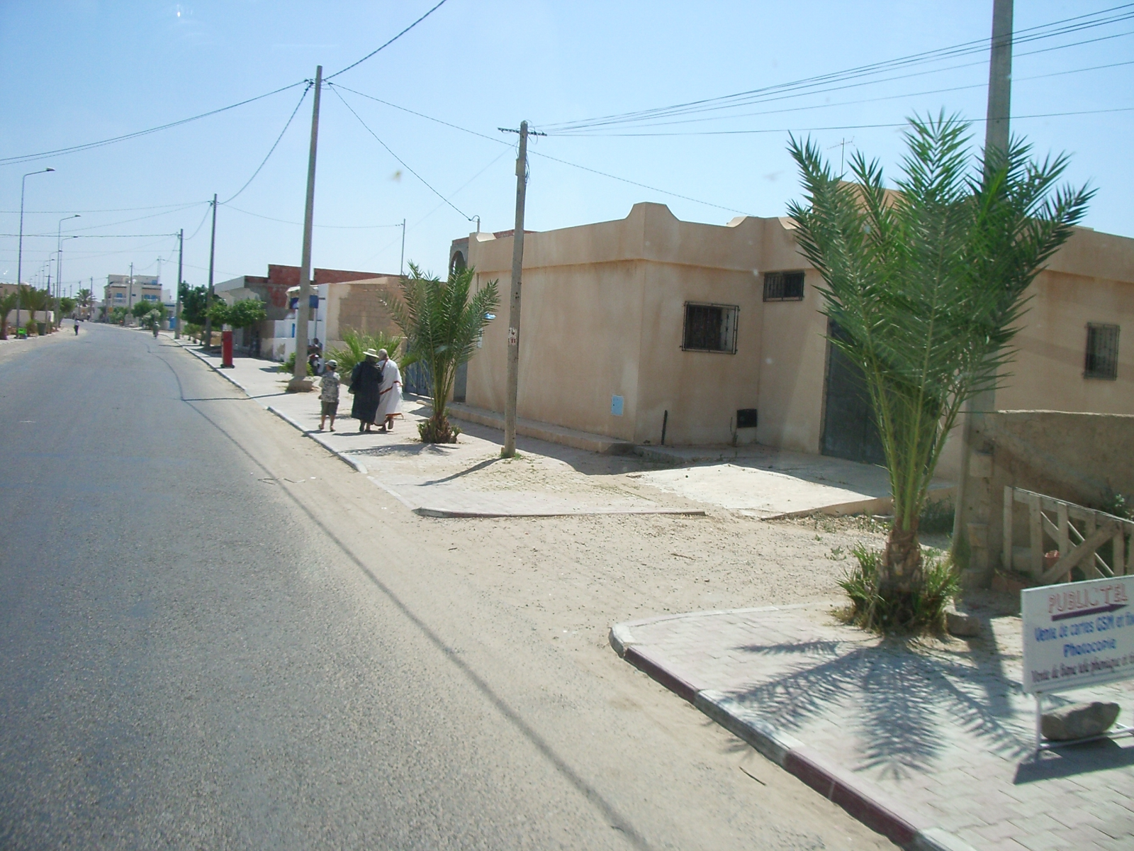 Mazrane, Djerba